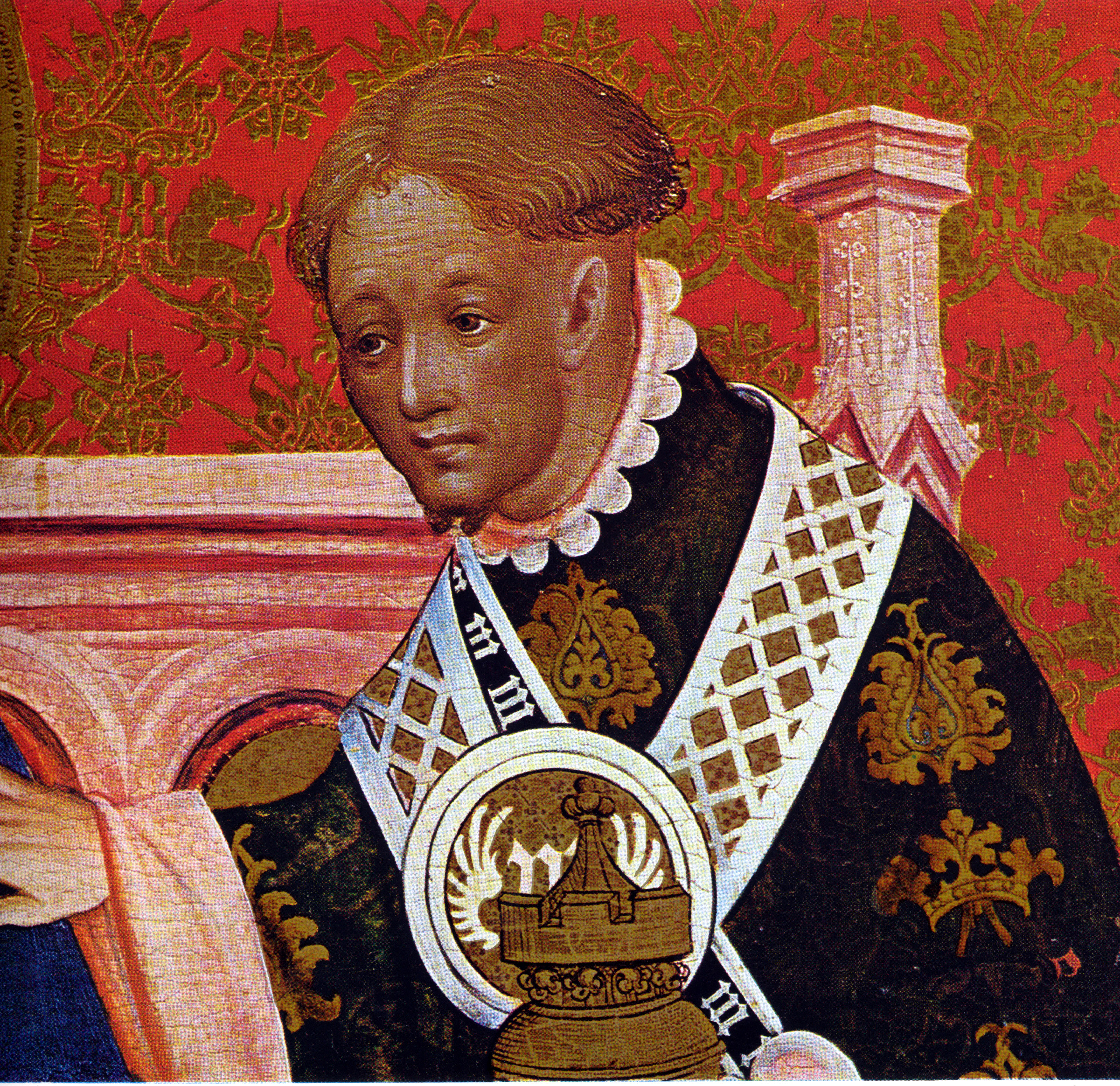 Marienkirche Dortmund, Marienaltar des Conrad von Soest, rechte Tafel, Ausschnitt aus der Anbetung der Könige